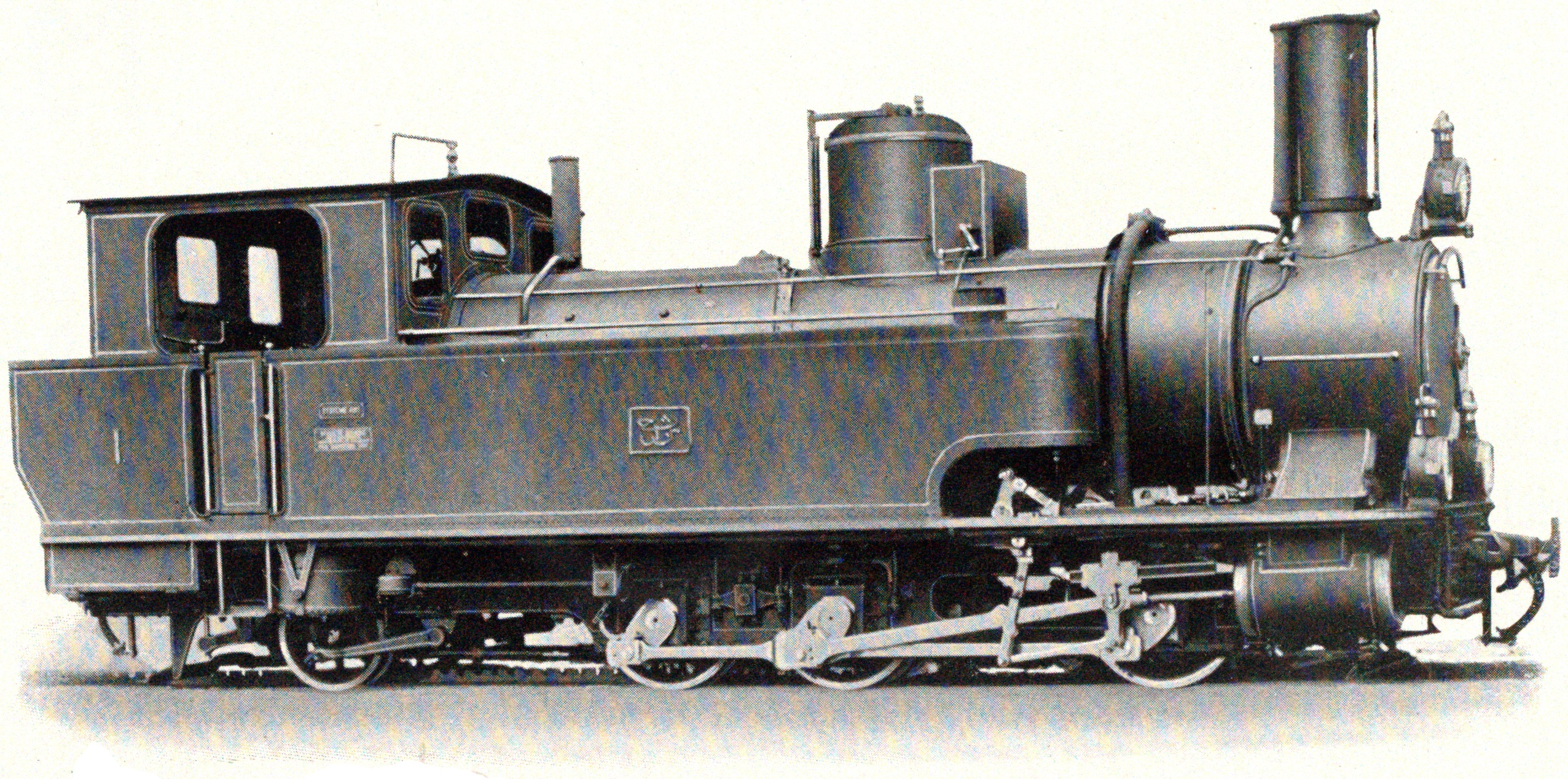 Beirut-Damaskus-Bahn: Tenderlokomotive mit drei gekuppelten Adhäsionsachsen und einer hinteren Laufachse für gemischten Adhäsions- und Zahnradantrieb, geliefert von der Schweizerischen Lokomotiv- und Maschinenfabrik Winterthur